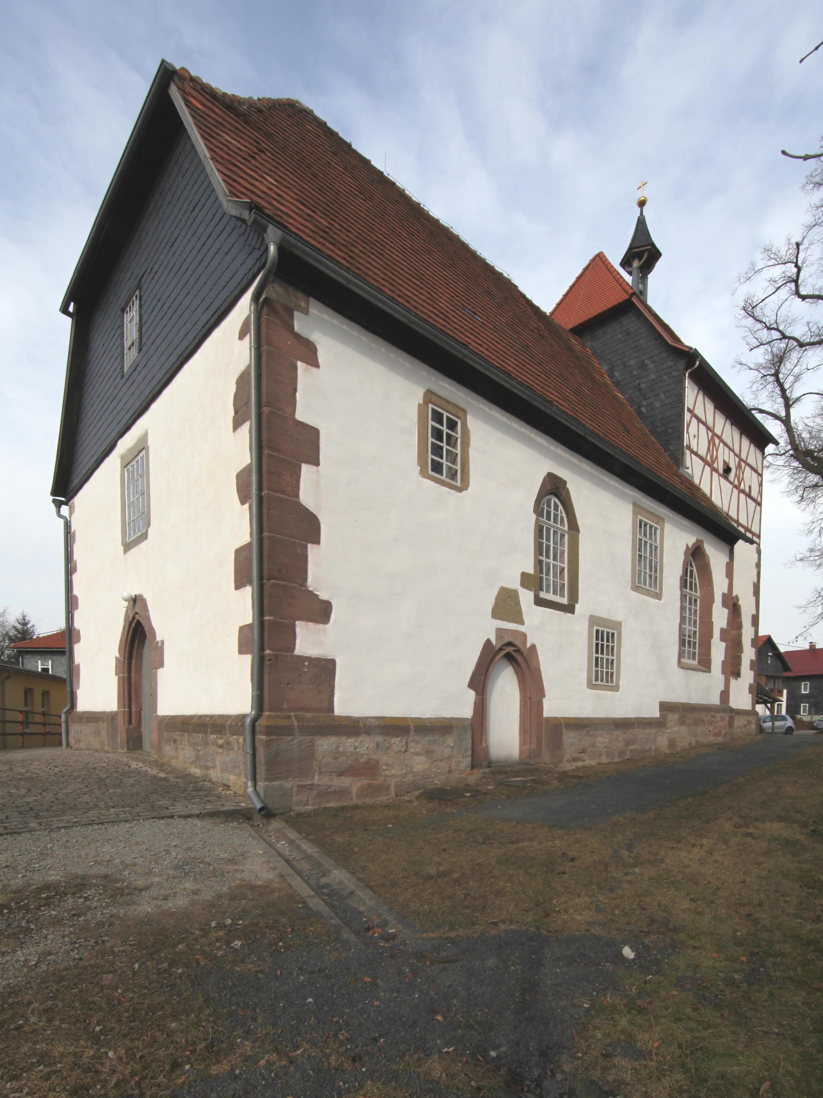 Evangelisch-Lutherische Kirche St. Ägidien in Heßberg, OT von Veilsdorf, Landkreis Hildburghausen